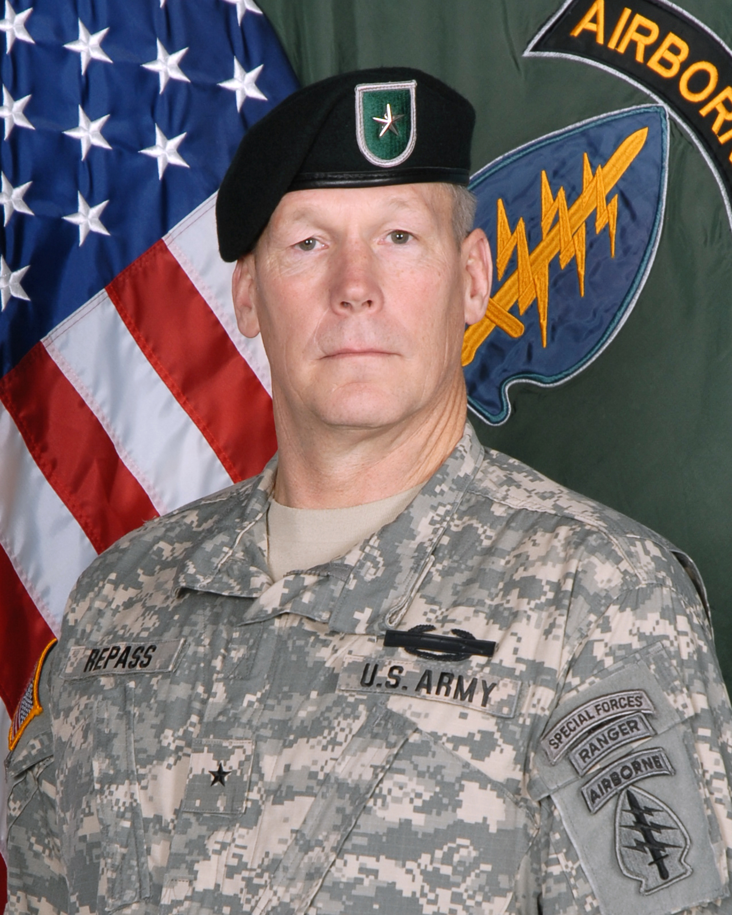 Brigadier General Michael S. Repass, Kommandierender General United States Army Special Forces Command